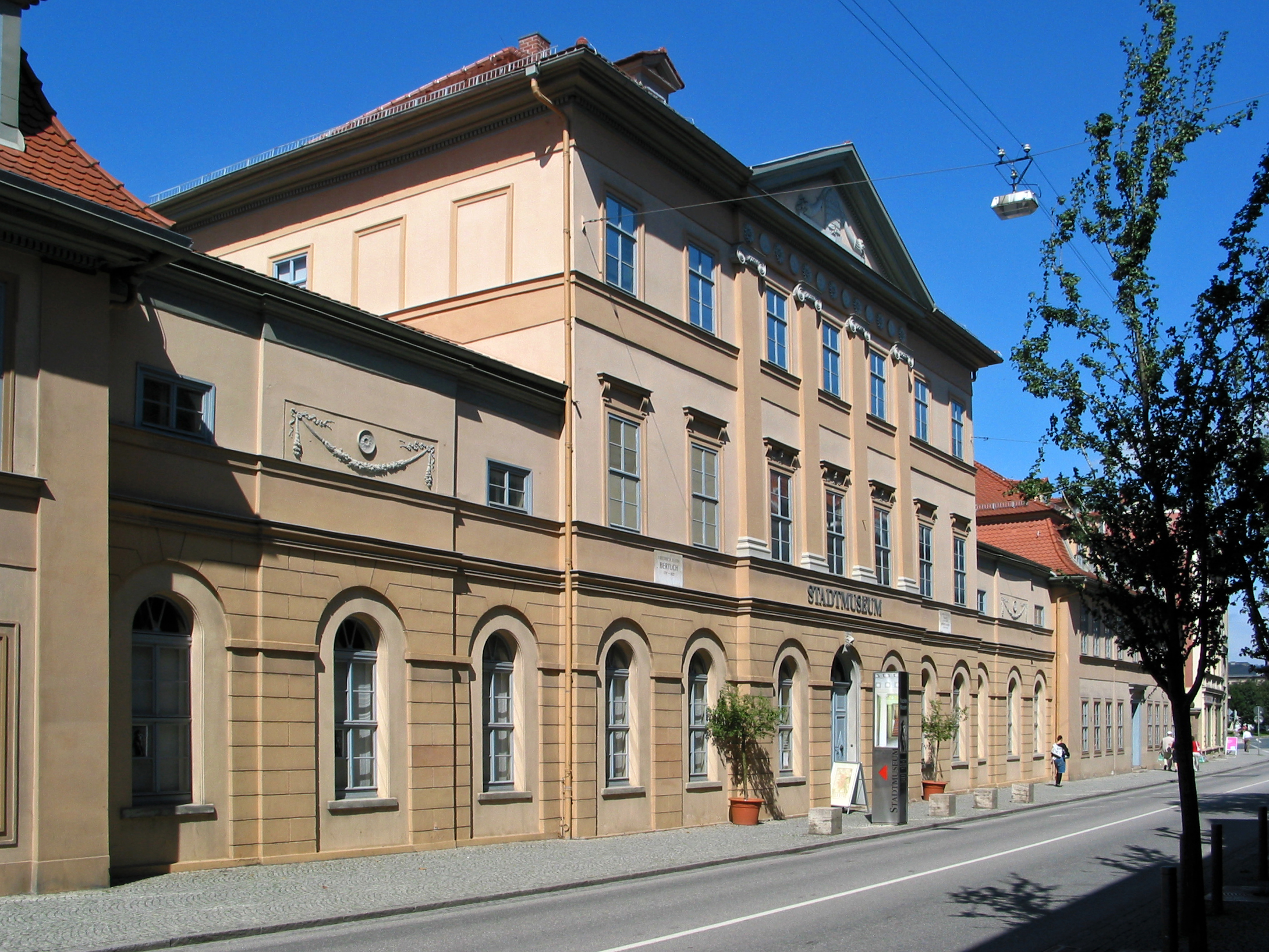 Ostansicht des ehem. Wohn- und Geschäftshauses von Friedrich Justin Bertuch, ab 1933 zeitweiliger Hauptsitz der NS-Gauleitung in Thüringen und seit 1954 Stadtmuseum Weimar.